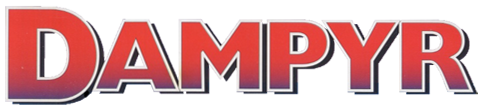 Logo di Dampyr Categoria:Immagini Sergio Bonelli Editore